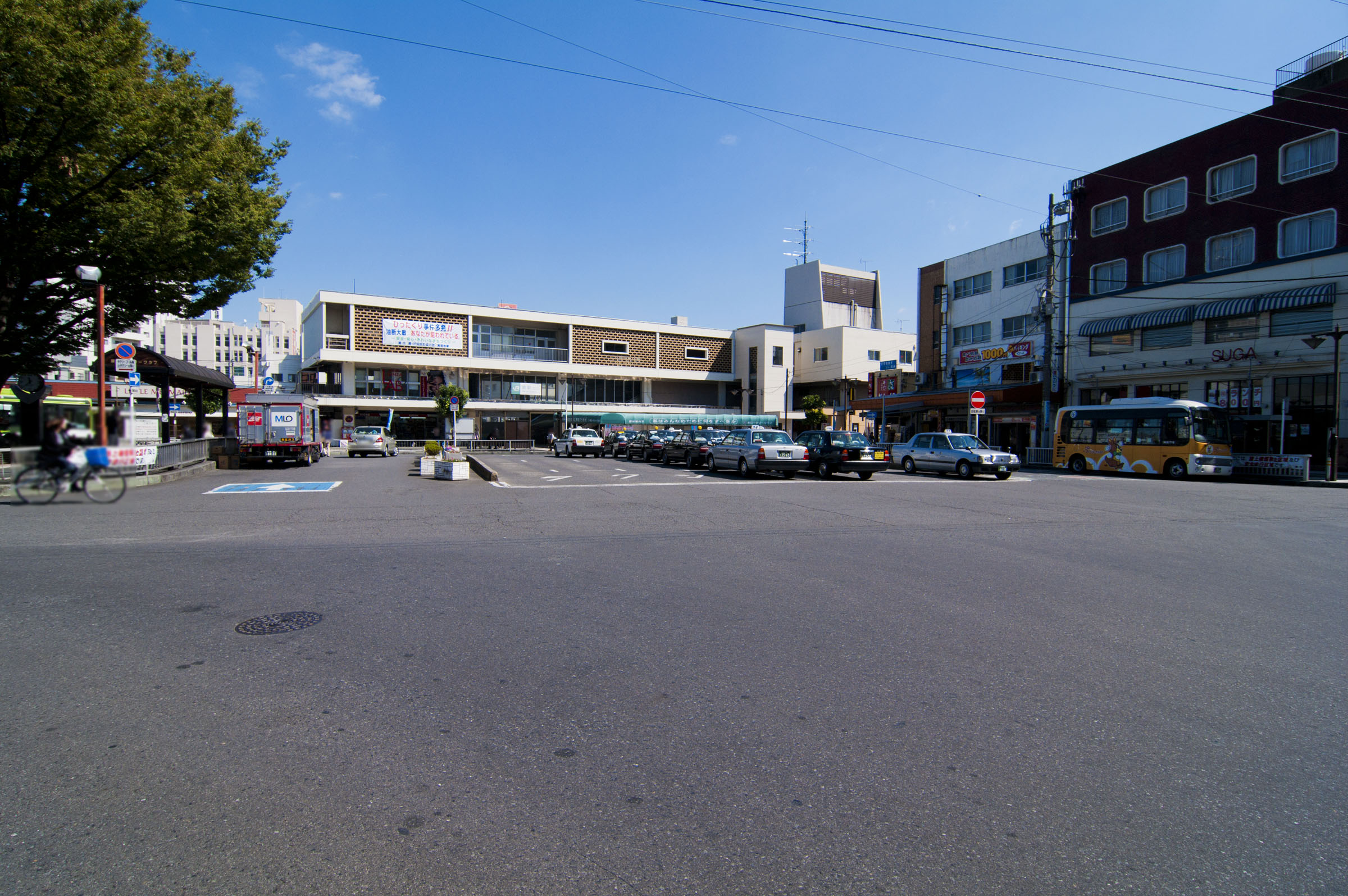 東日本旅客鉄道東北本線蕨駅（京浜東北線のみ停車）